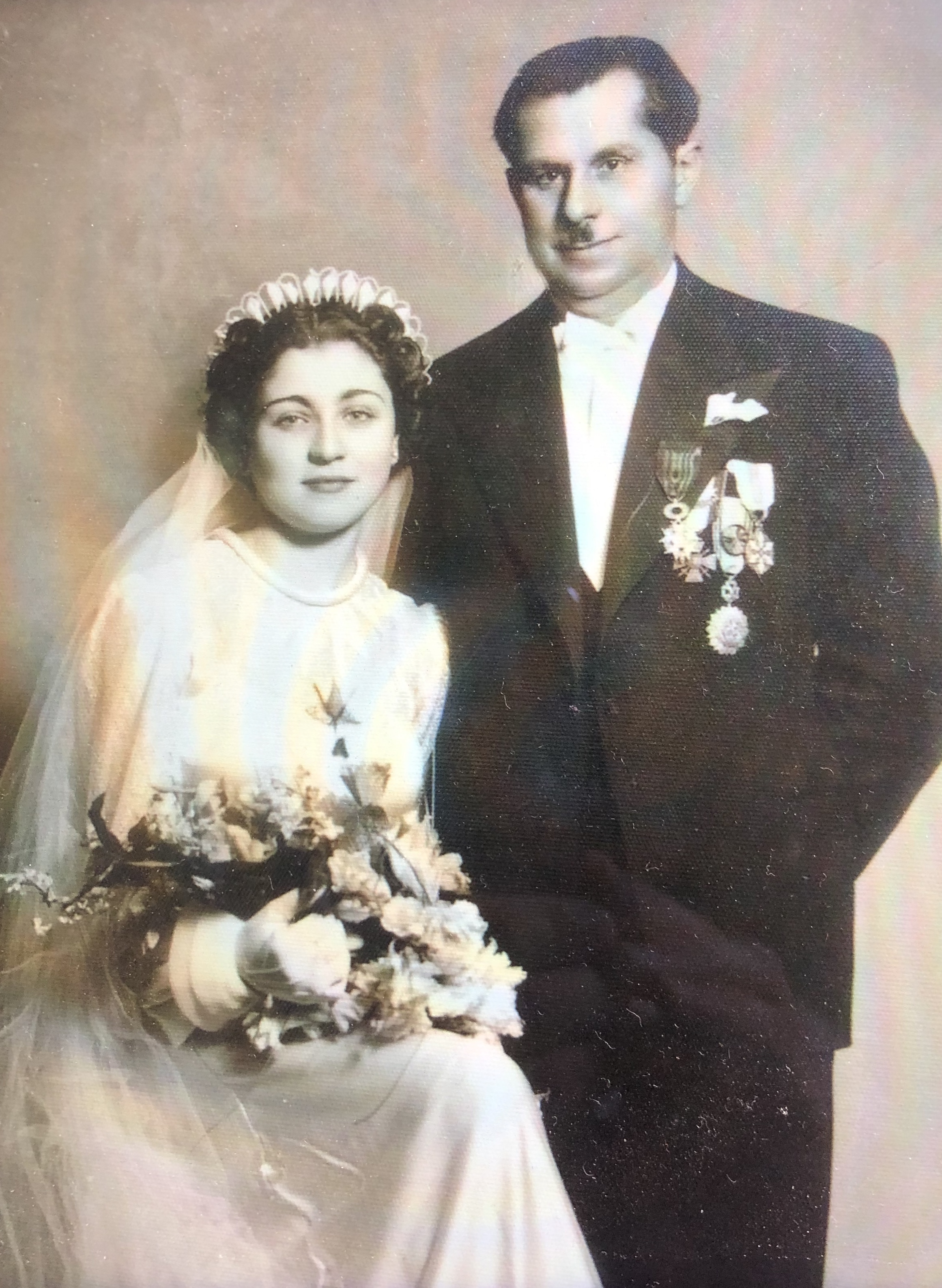 Monsieur le Maire de la ville de Kaméchli